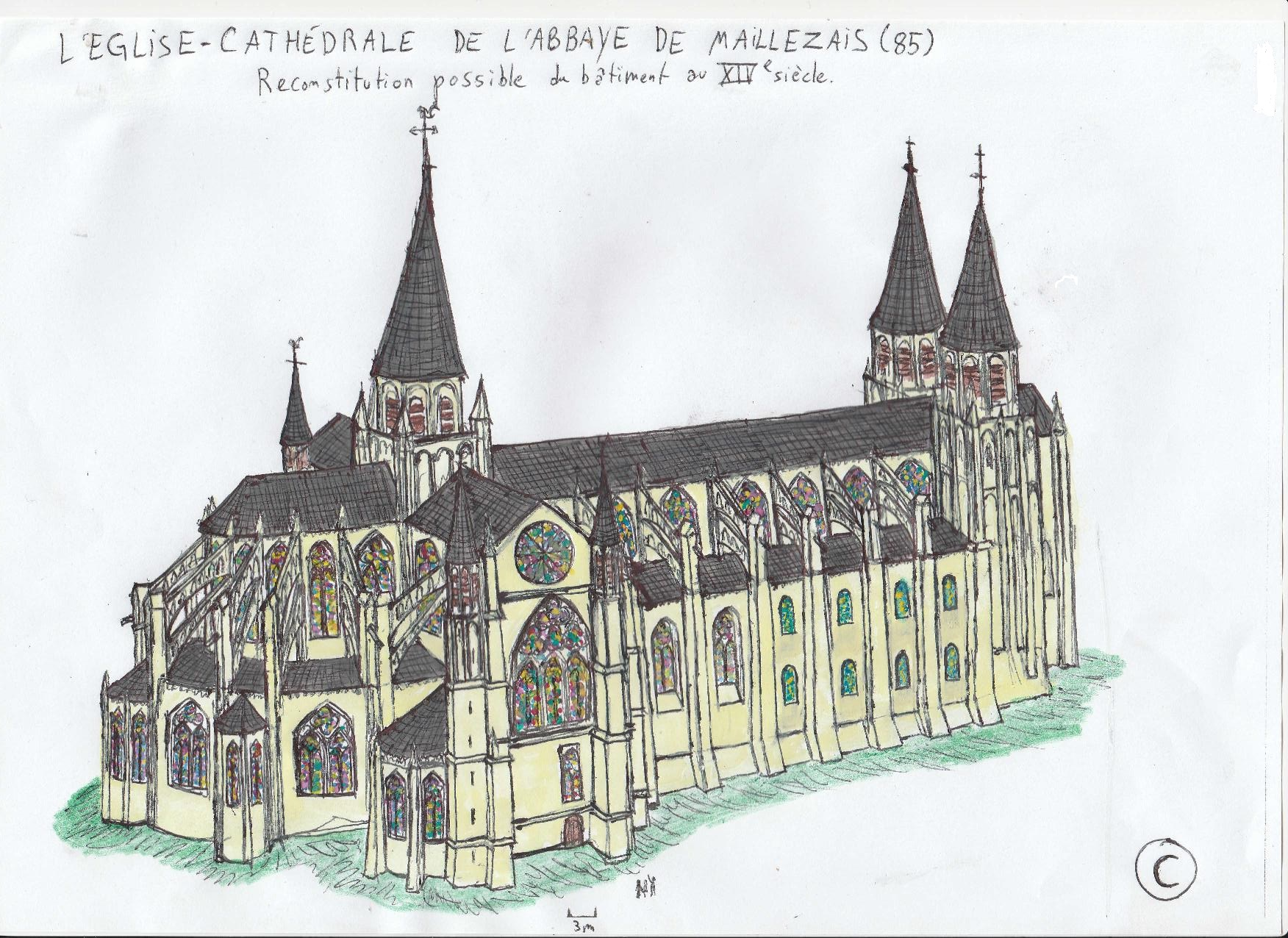 Aquarelle représentant une reconstitution possible de la cathédrale abbatiale de Maillezais au XIVe siècle.